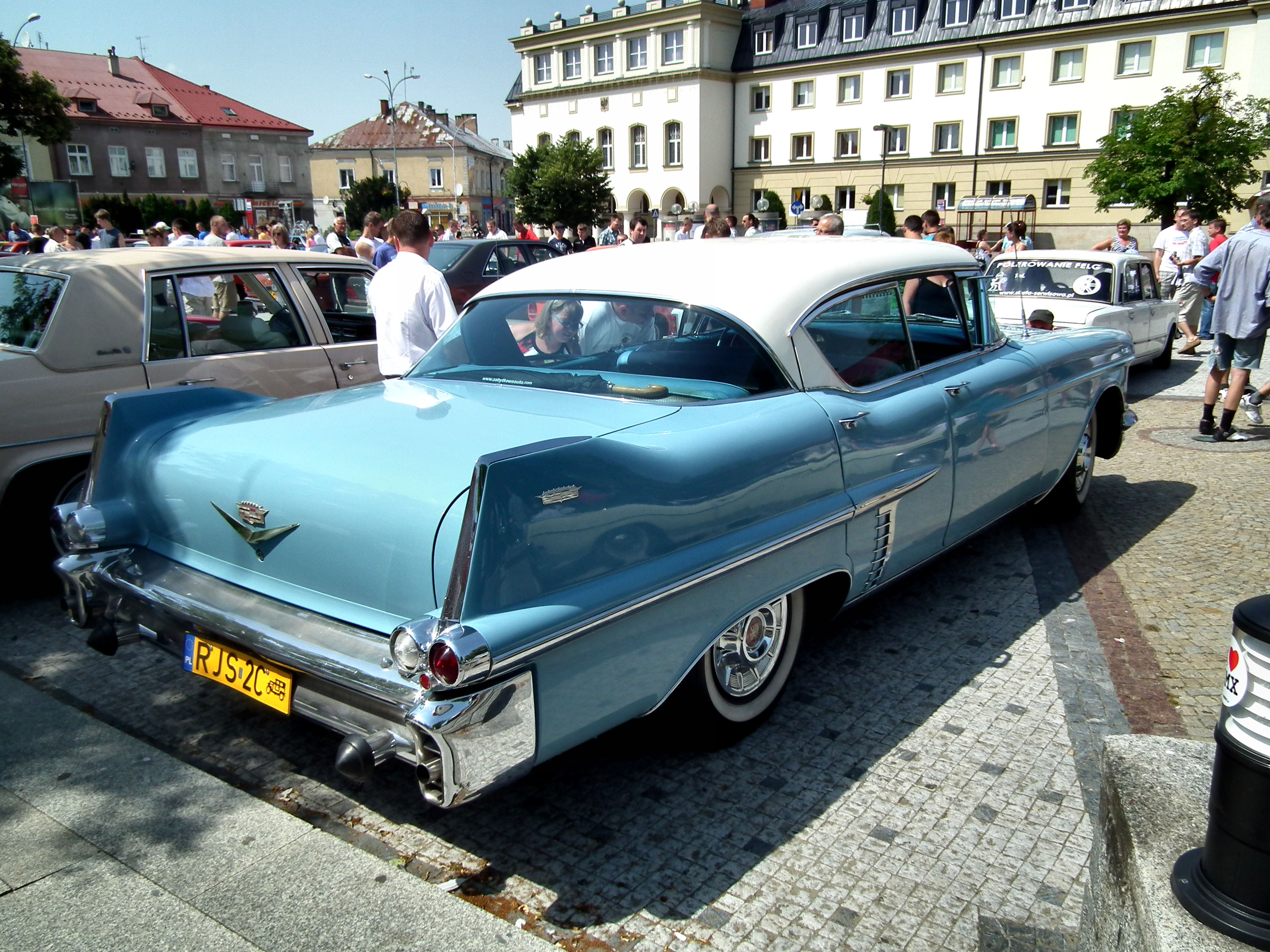 Cadillac Eldorado z 1957 roku w Jaśle.